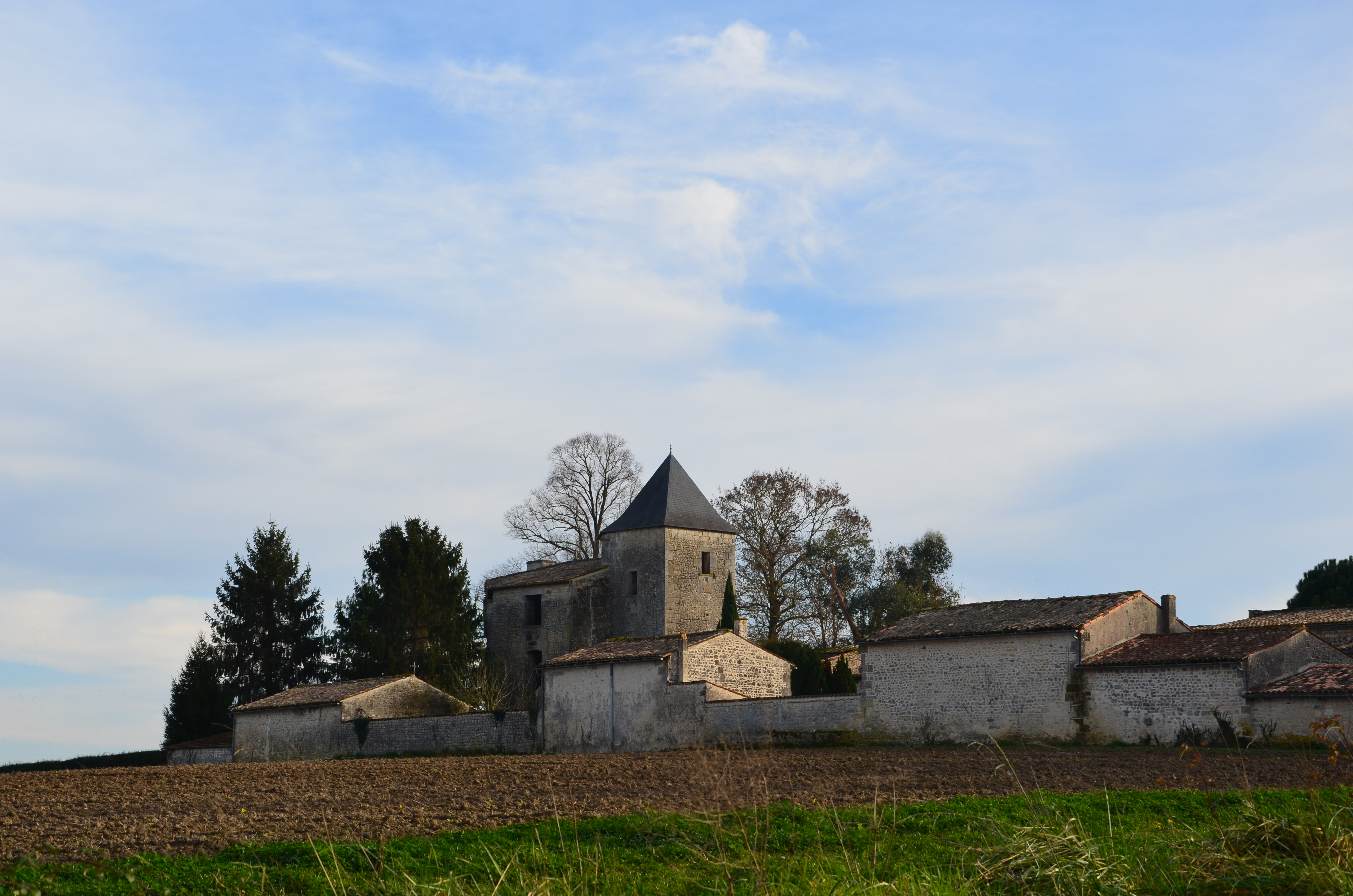 Chäteau de Nieul (Nieuil), 1591.